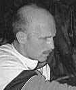 uppercut1.jpg